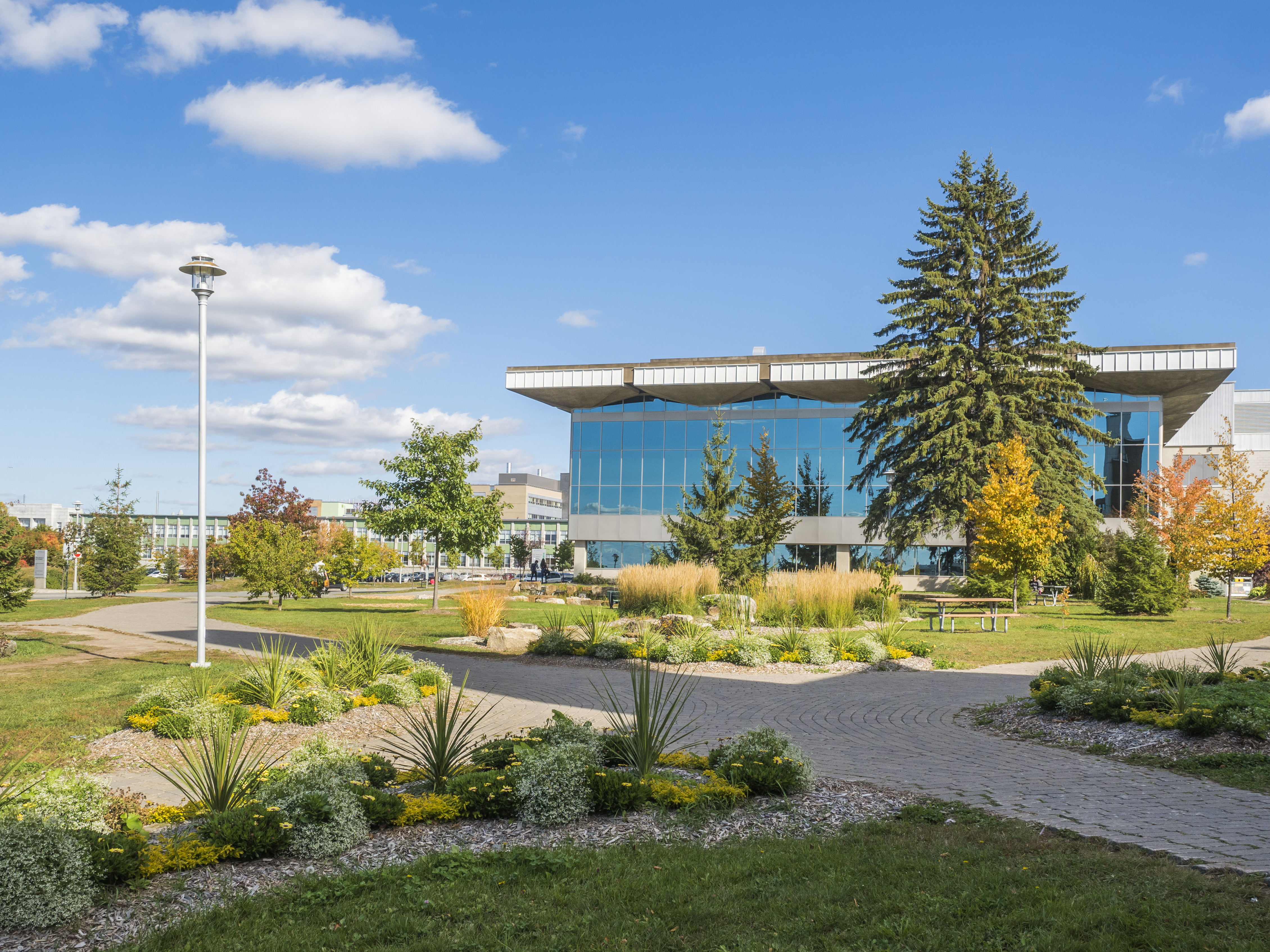 Le Pavillon Georges-Cabana abrite le Carrefour de l'information, la Bibliothèque Roger-Maltais, le Centre de services ainsi que plusieurs bureaux administratifs.